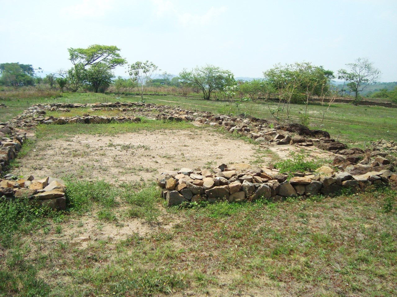 SITIO ARQUEOLÓGICO CIUDAD VIEJA, CUSCATLAN